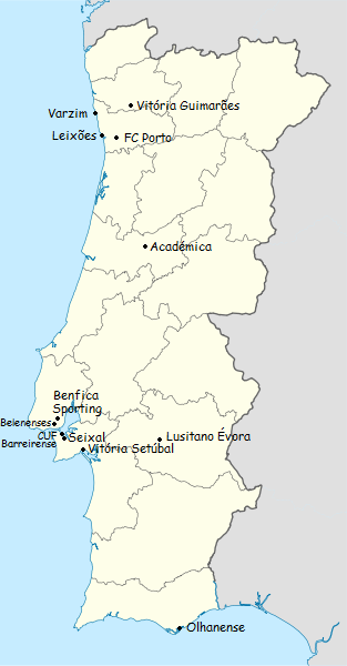 Carta dos clubes participantes do campeonato de portugal de futebol de primeira divisao 1963-1964